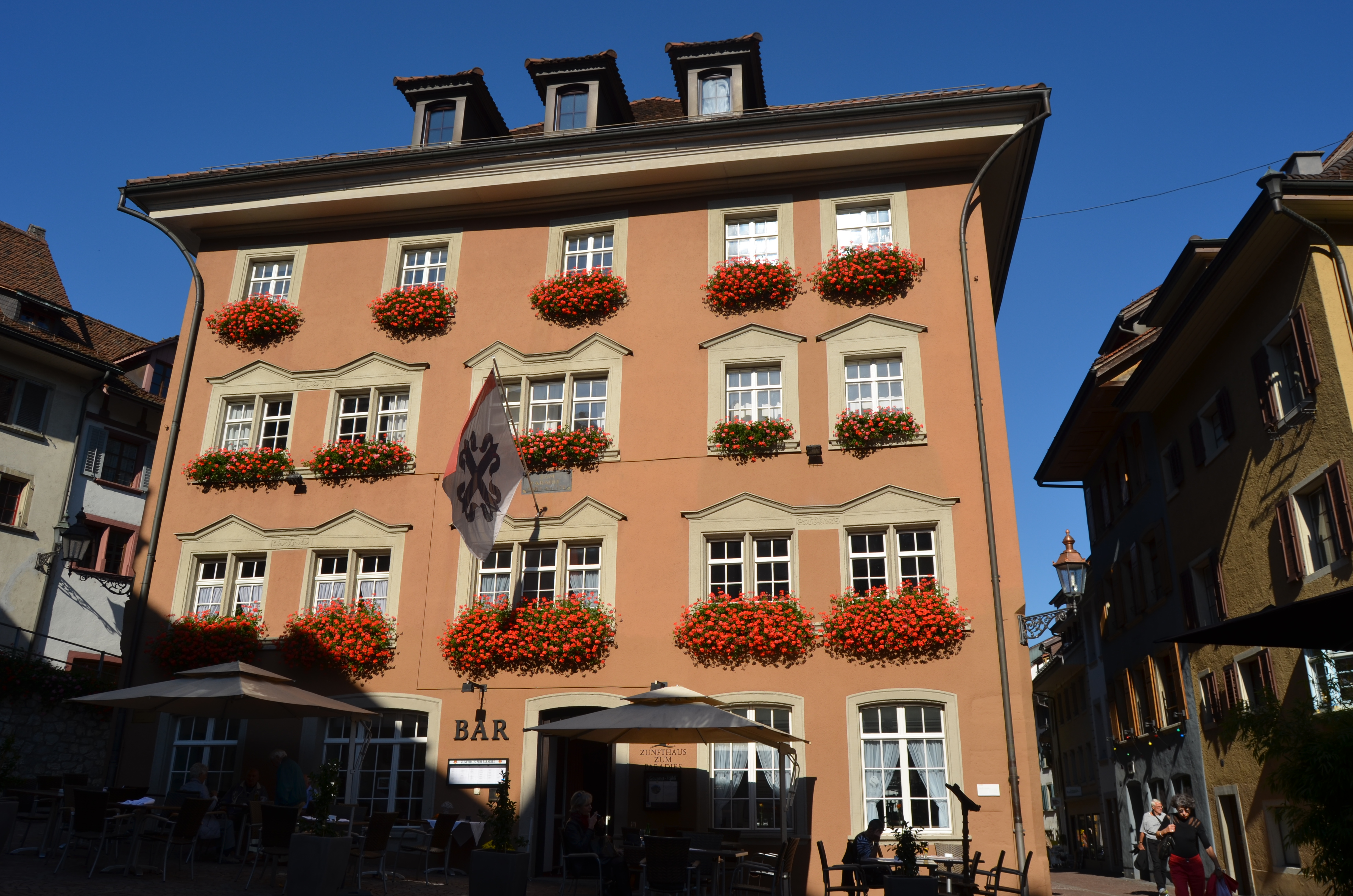 Zunfthaus und Restaurant "Paradies". KGS_Nr = 9758. Cordulaplatz, Baden (AG). 665.454 / 258.316. Kategorie: A, Objektart: Bauten fuer Oeffentlichkeit, Gasthoefe, Pensionen, Herbergen. Koordinaten N 47.47208 E 8.30677. Link zur Geschichte des Hauses